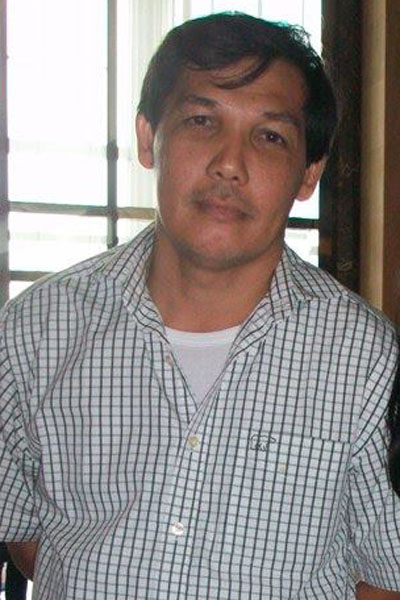 Ricky Yakobi, pemain sepak bola legendaris Indonesia yang diturunkan pada pertandingan Indonesia Legend vs. AC Milan Glorie di Jakarta tahun 2011